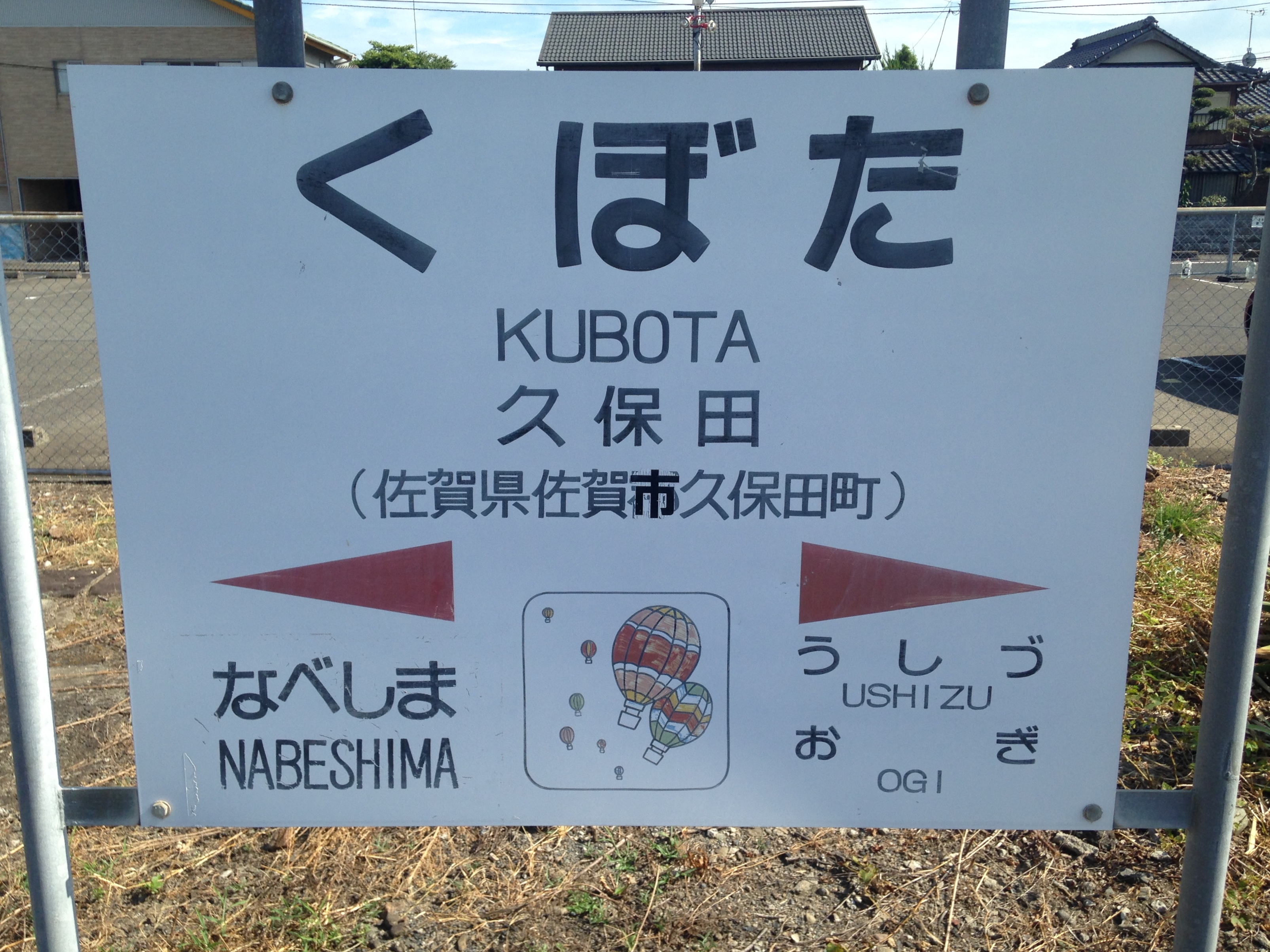 久保田駅の駅名標。イラストは「佐賀インターナショナルバルーンフェスタ」